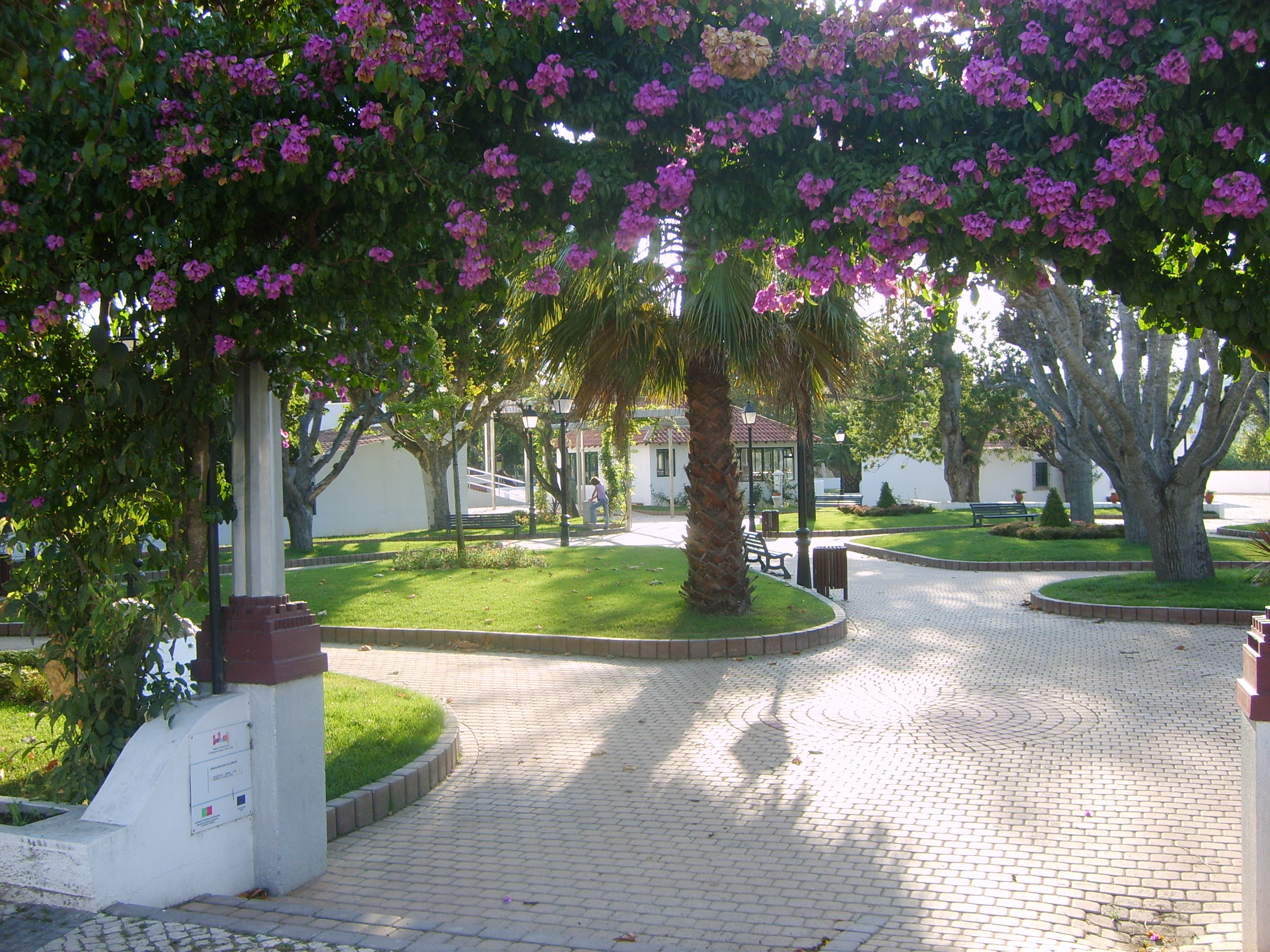 Lourinhã